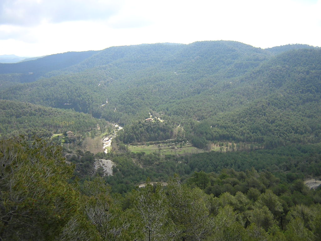 La Vall de Marfà (Castellcir, Moianès)